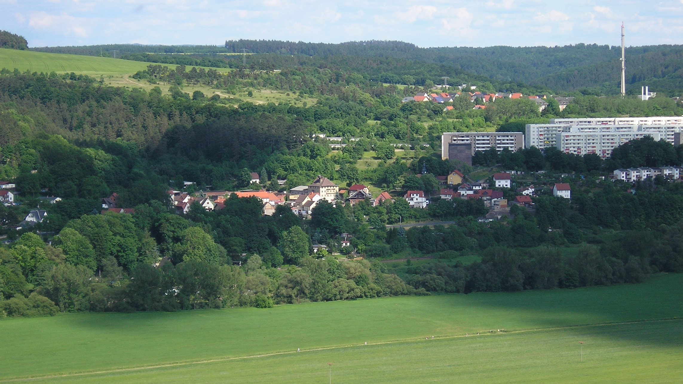 Blick auf den dörflichen Stadtteil Welkershausen der Stadt Meiningen, rechts anschließend die Wohnblocks vom Stadtteil Jerusalem.